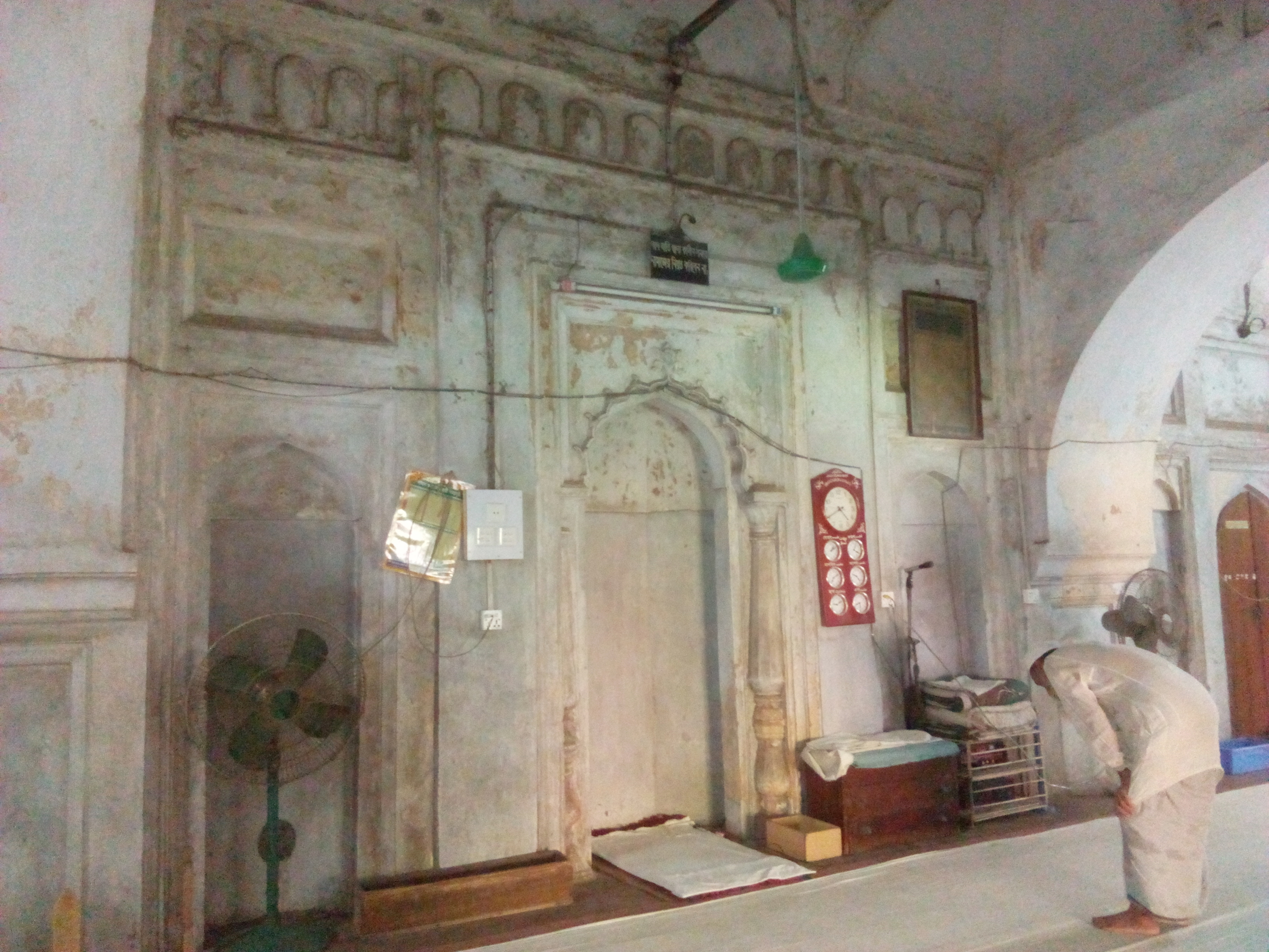 This is the inner side of the mosque.